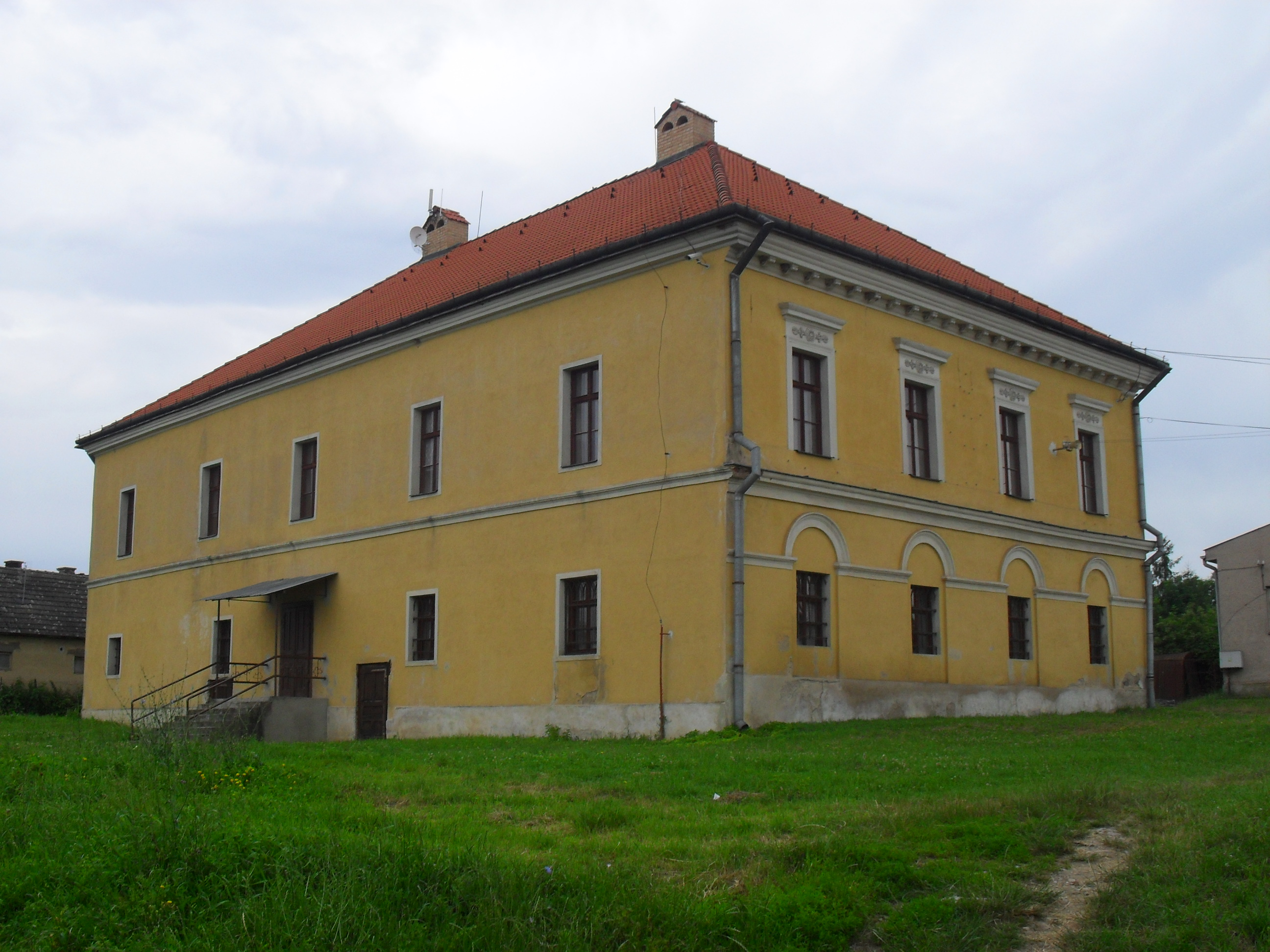 Uzapanyit - kastély